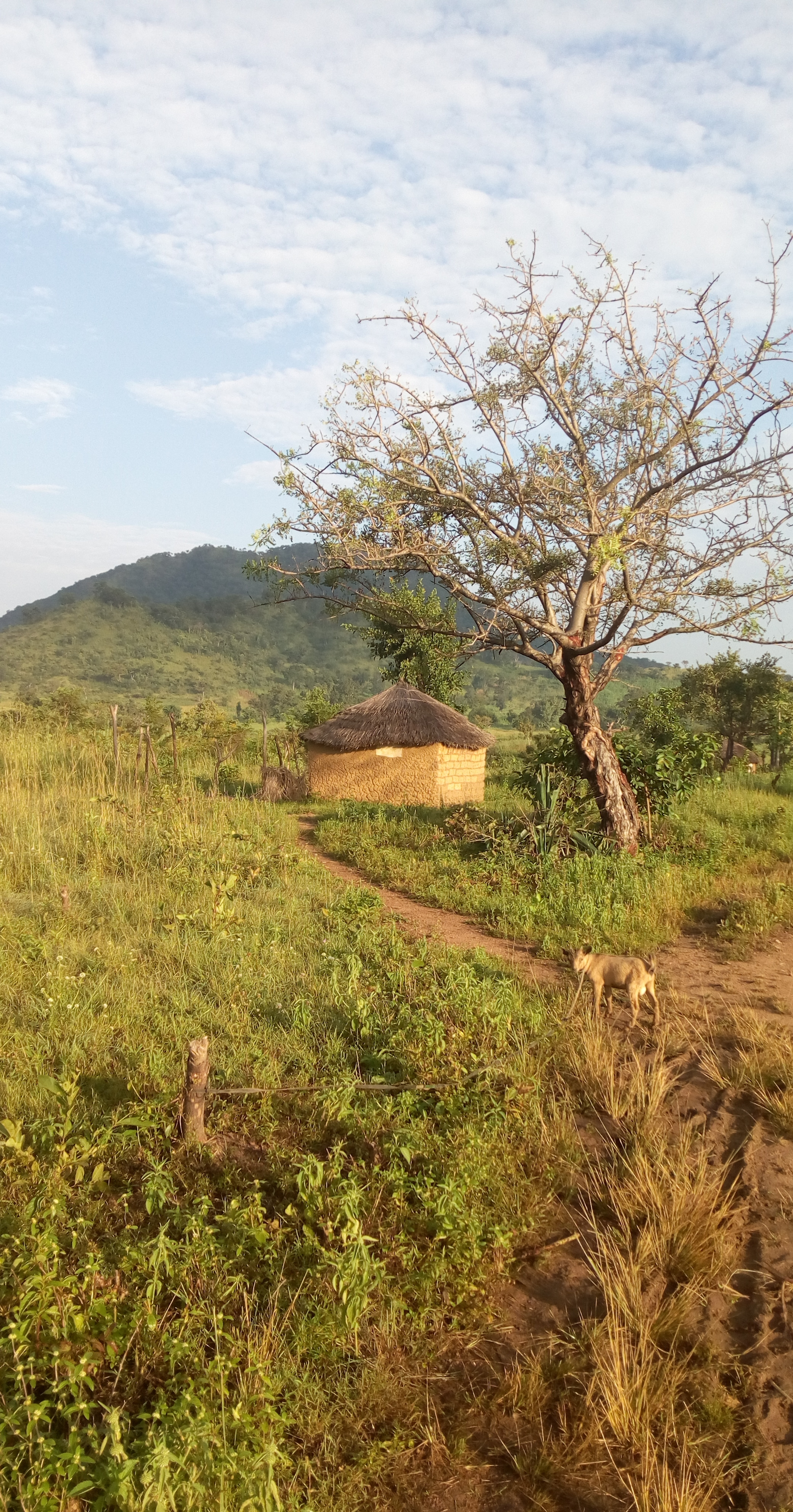 La beauté du paysage à Poli au Nord Cameroun